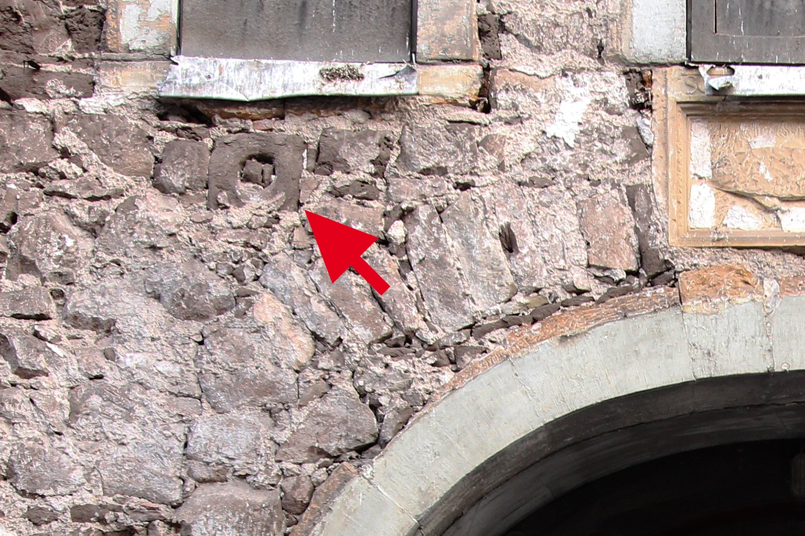 Gotha, Augustinerstraße, Amtshaus, linke vermauerte Biereigenöffnungen über dem Portal, 2014